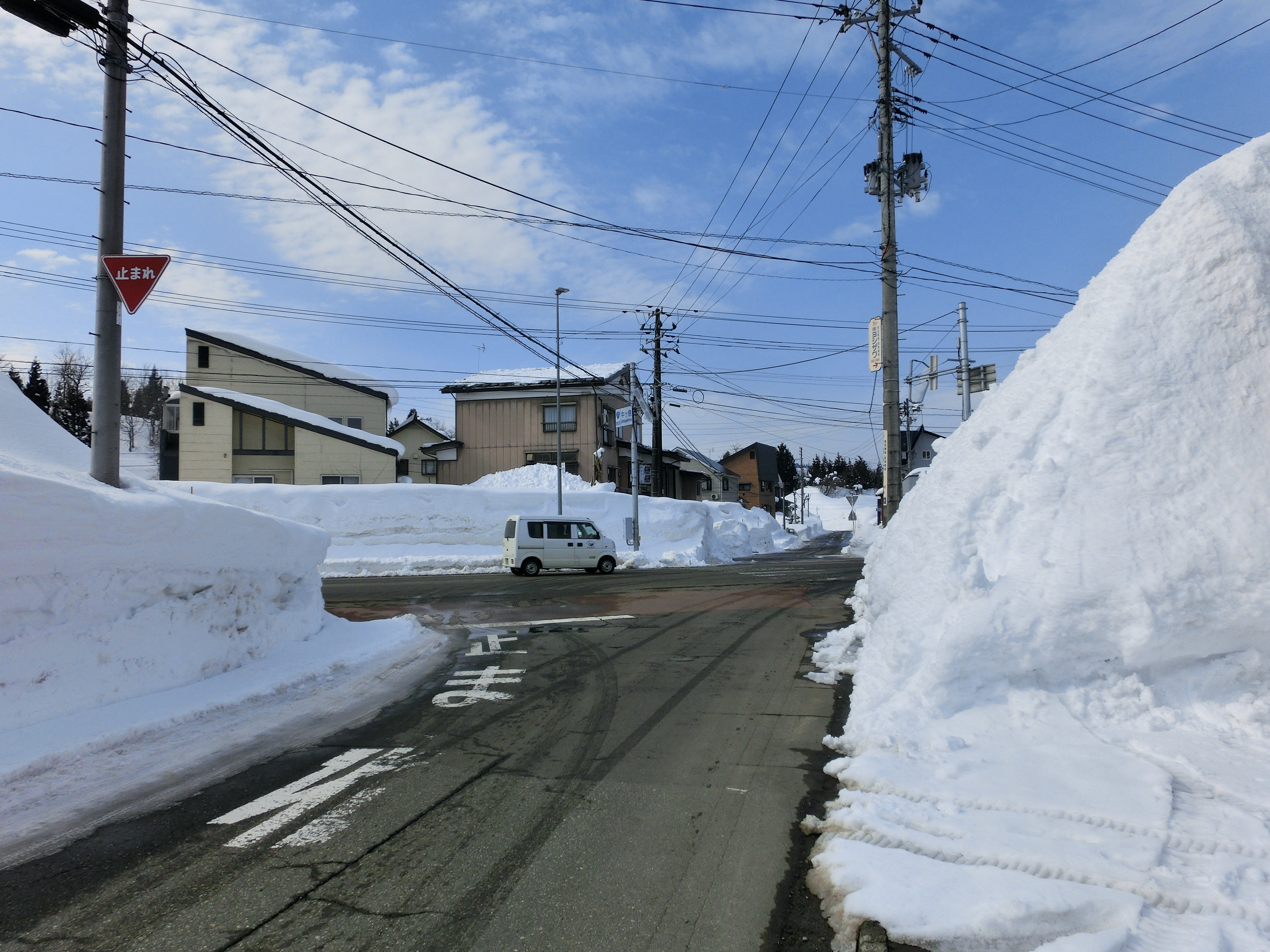 この画像は2018年2月10日、新潟県長岡市川口牛ヶ島にて撮影された国道17号牛ヶ島交差点の写真。